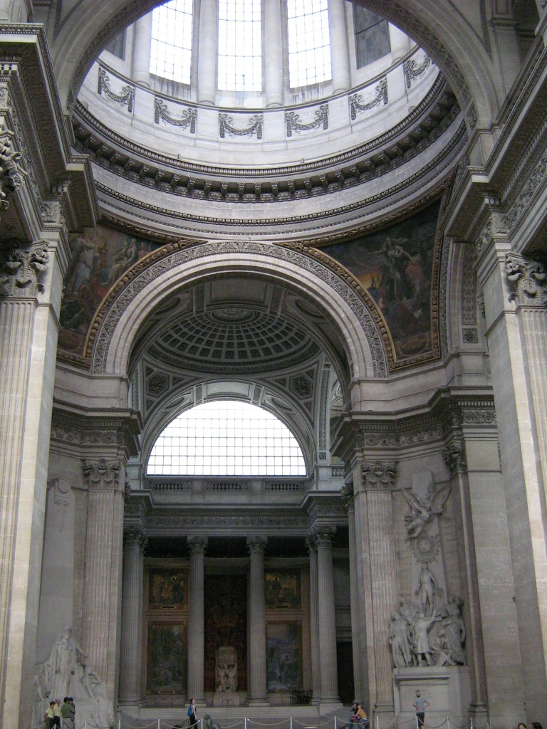 Pantheon' un içi